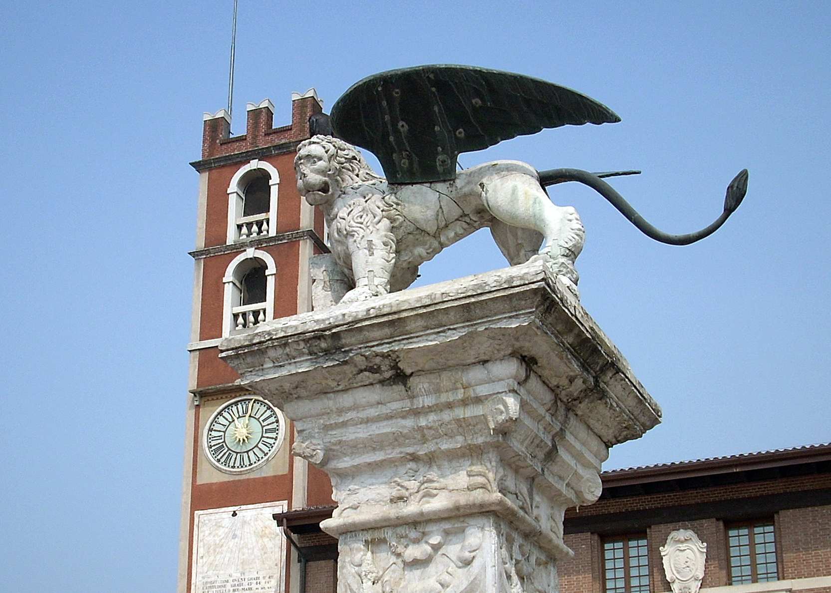 MAROSTICA